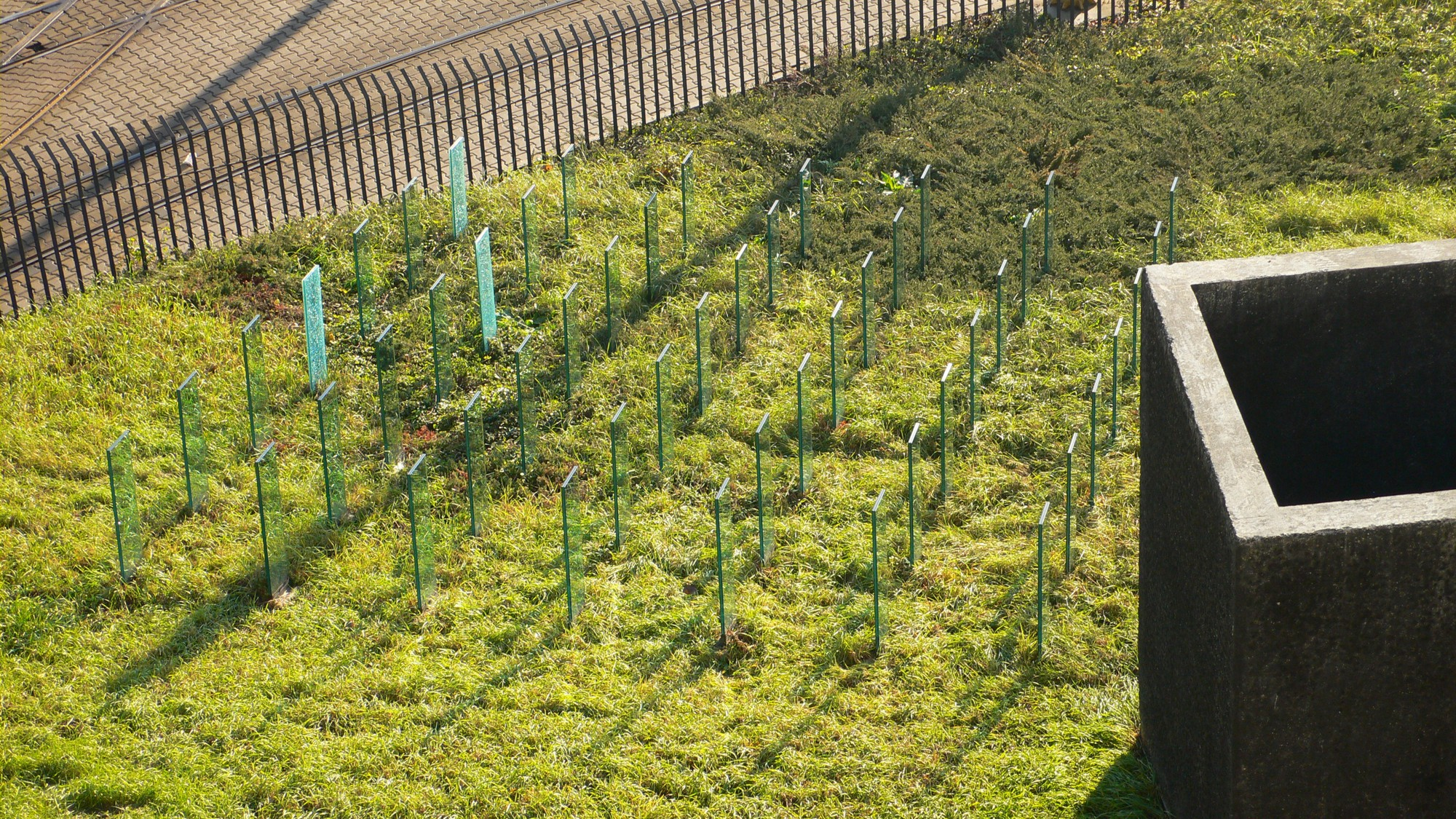 Mauzóleum Chatama Sófera